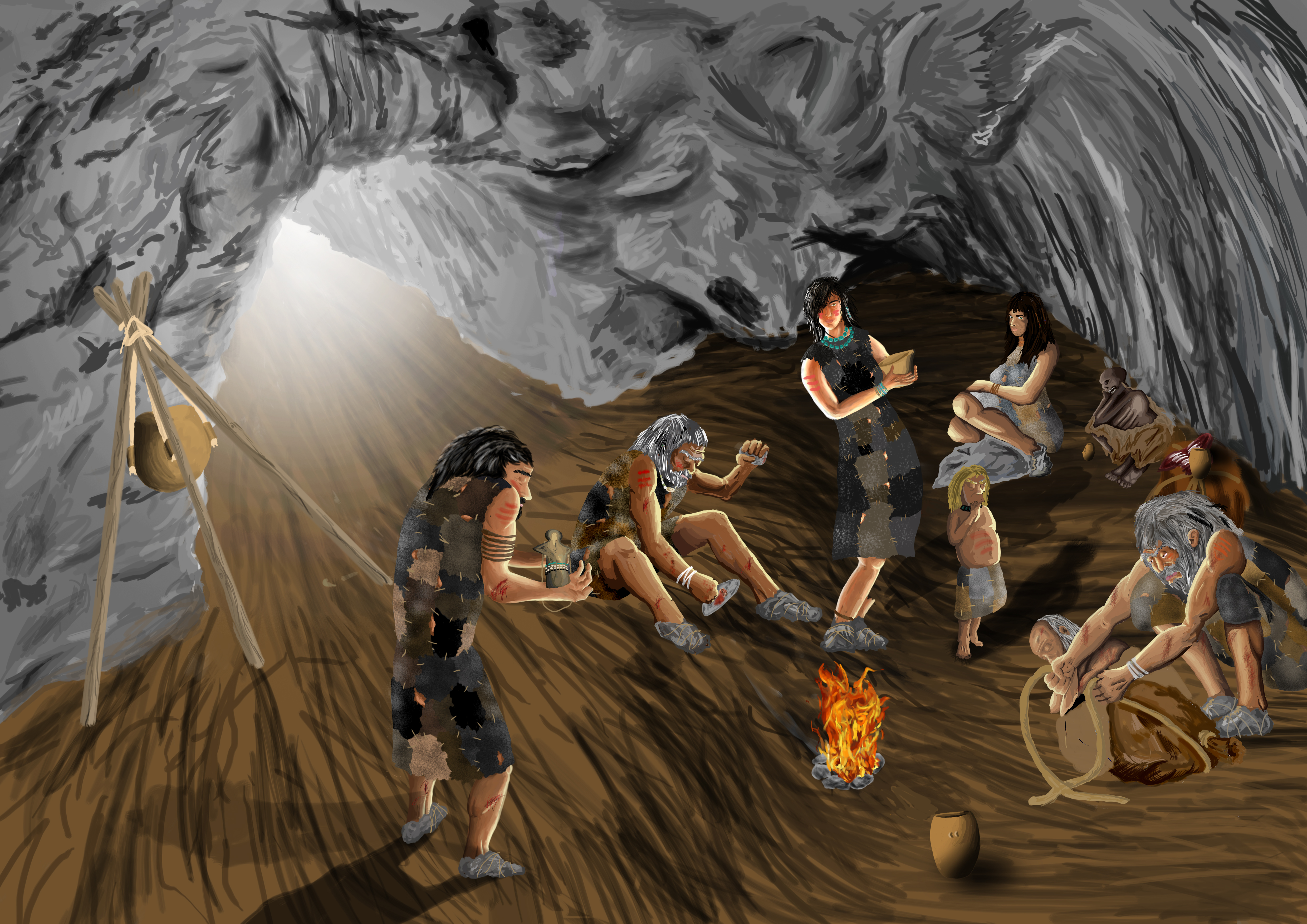 Recreació d'un enterrament neolític a la Cova de Can Sadurní de Begues. Hi podem observar els diversos enterraments duts a terme al marge dret així com els ritus documentats al jaciment arqueològic de la mateixa cova: la preparació d'ocre i cervesa, així com el culte a una figura antropomorfa, "l'Encantat de Begues", i la disposició d'un conjunt de fragments d'animals a l'entorn dels cadàvers.